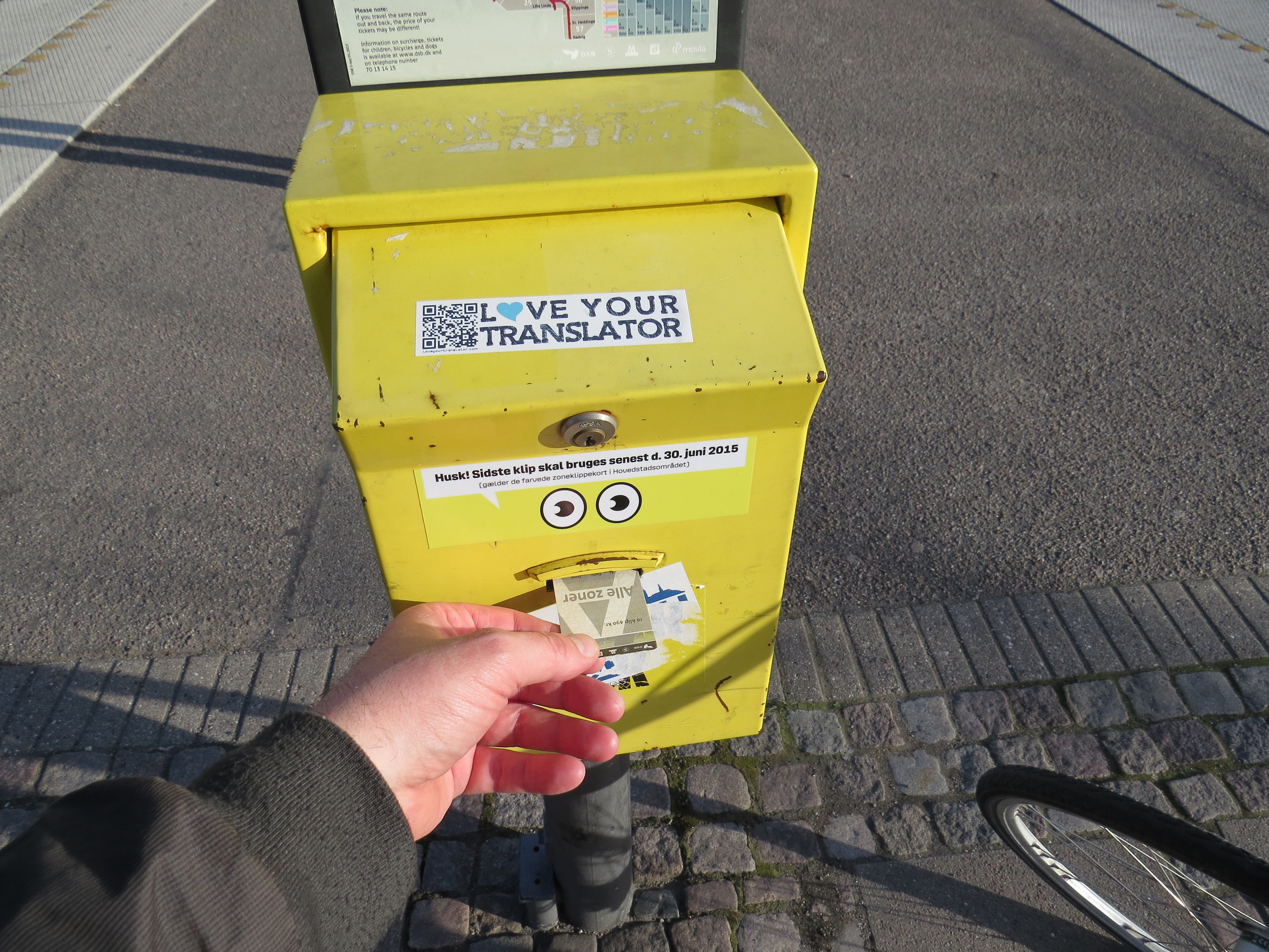 Gråt klippekort, Sjælland